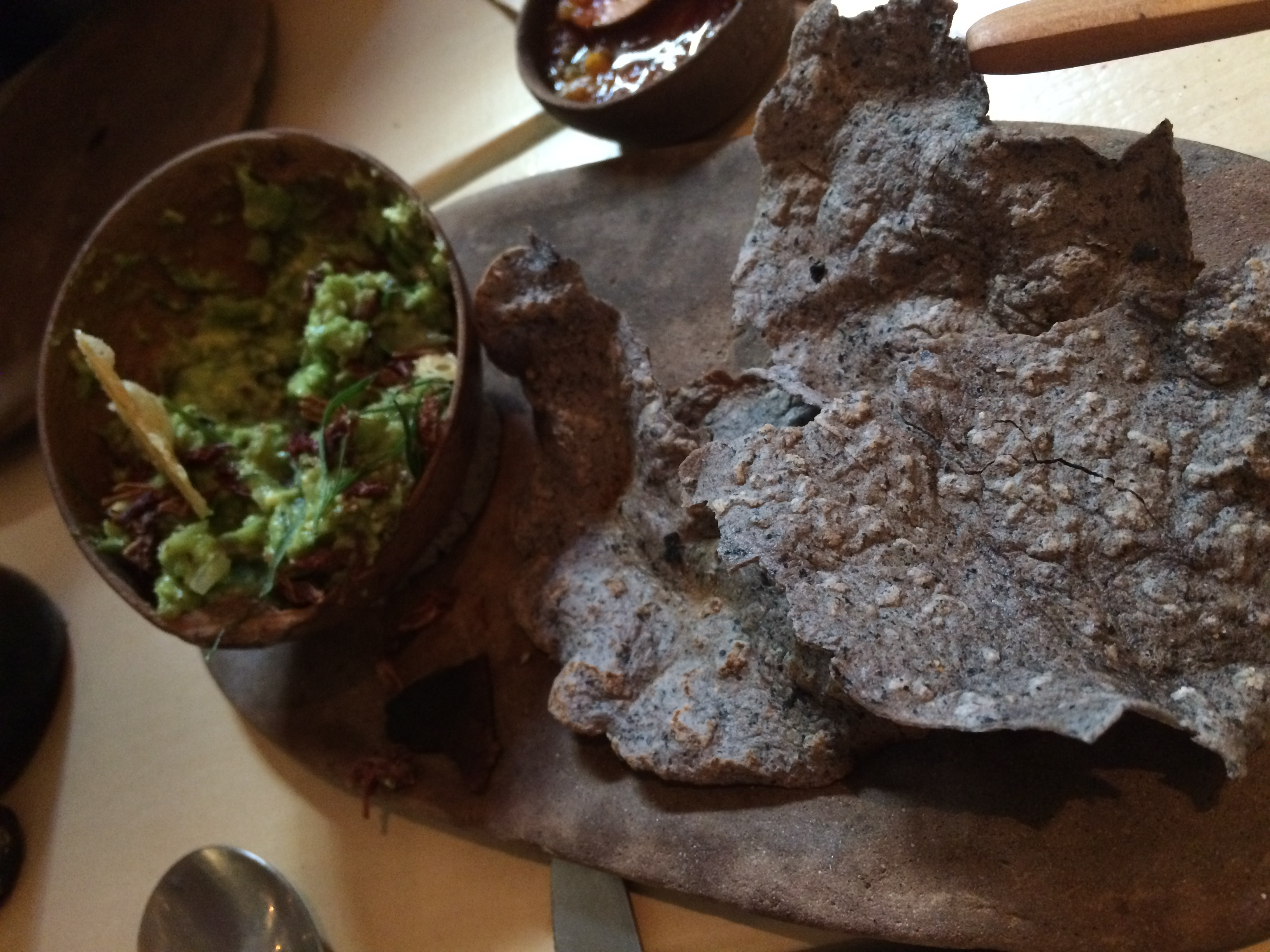 Guacamole con chapulines y totopos de maíz azul.